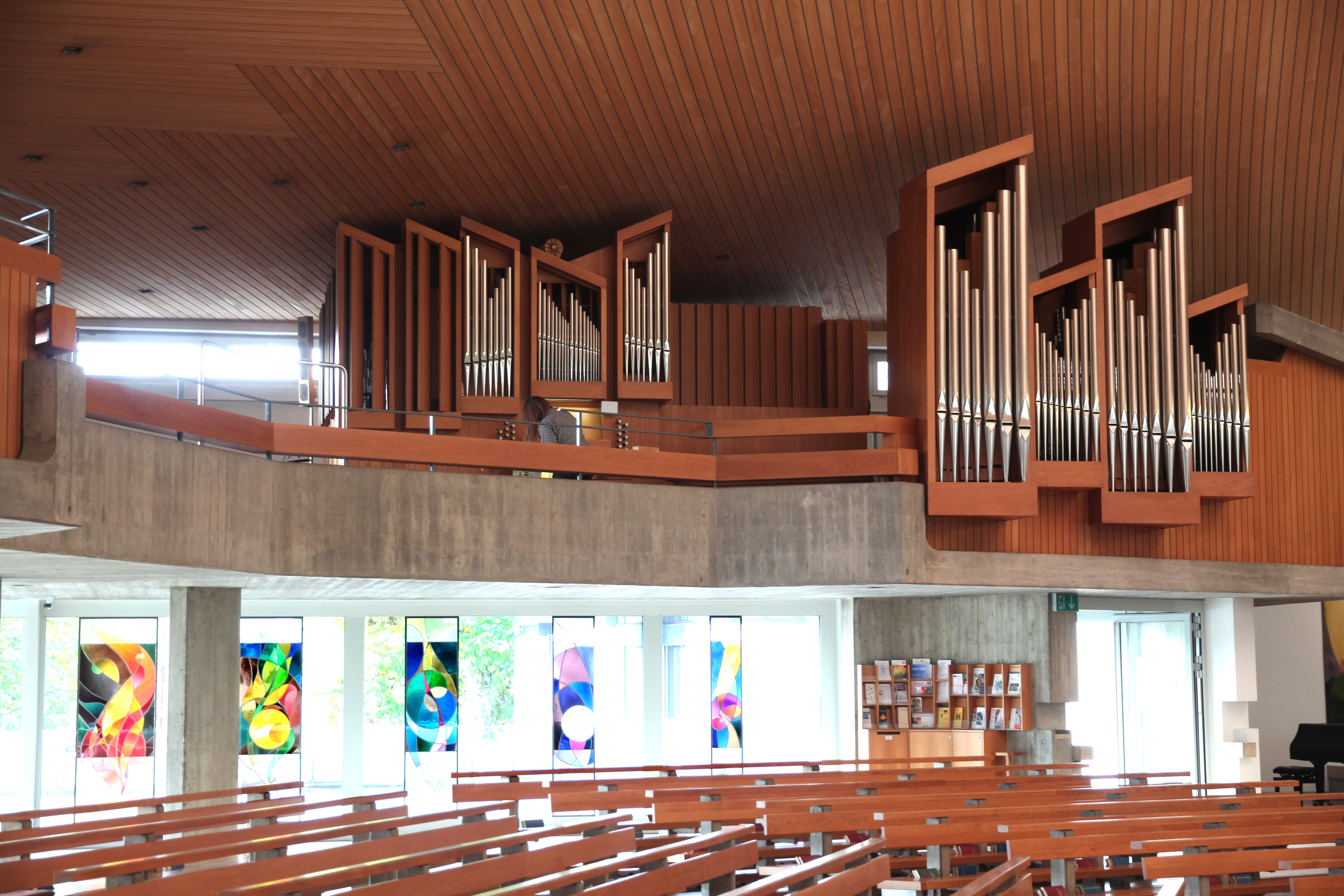 Römisch-katholische Pfarrkirche St. Andreas Uster, Orgel